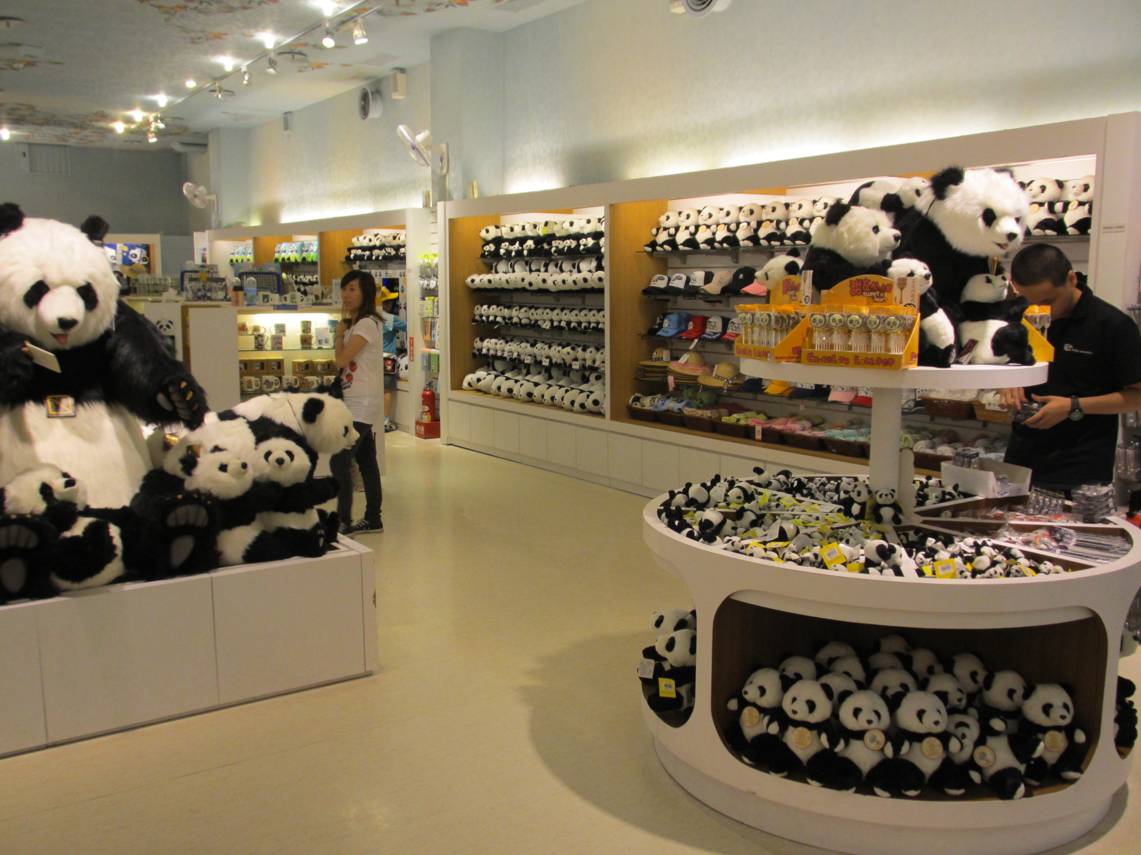 臺北市立動物園大貓熊館紀念品店。